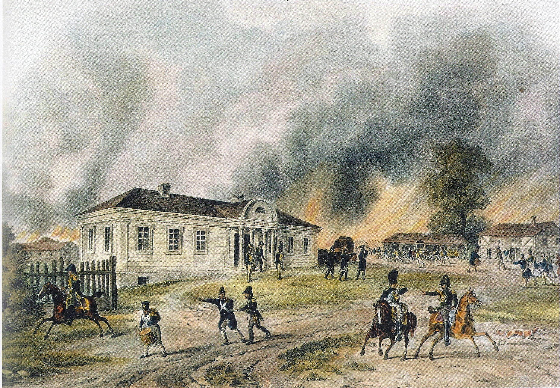 Беларуская (тарашкевіца): Докшыцы (Dokšycy), 18 ліпеня 1812